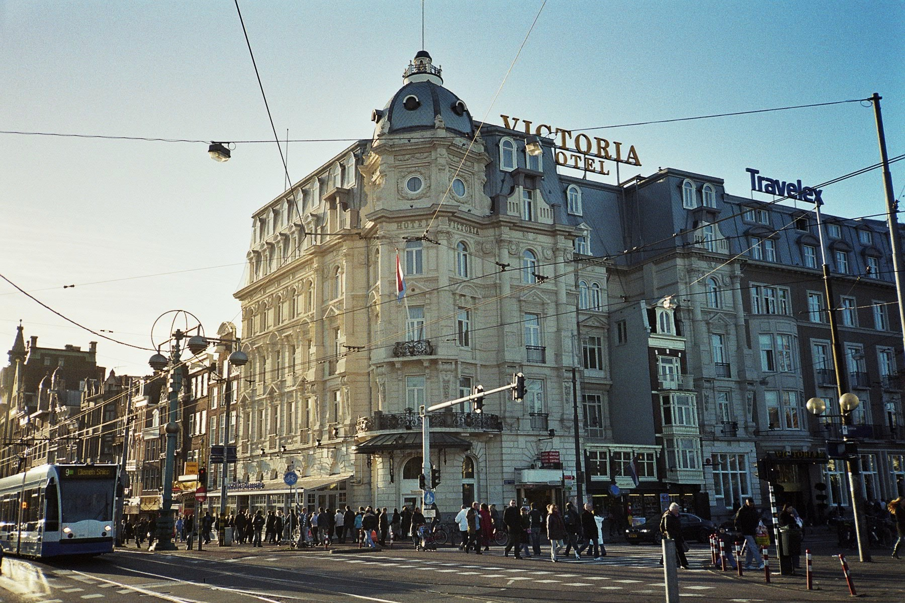 Victoriahotel Amsterdam